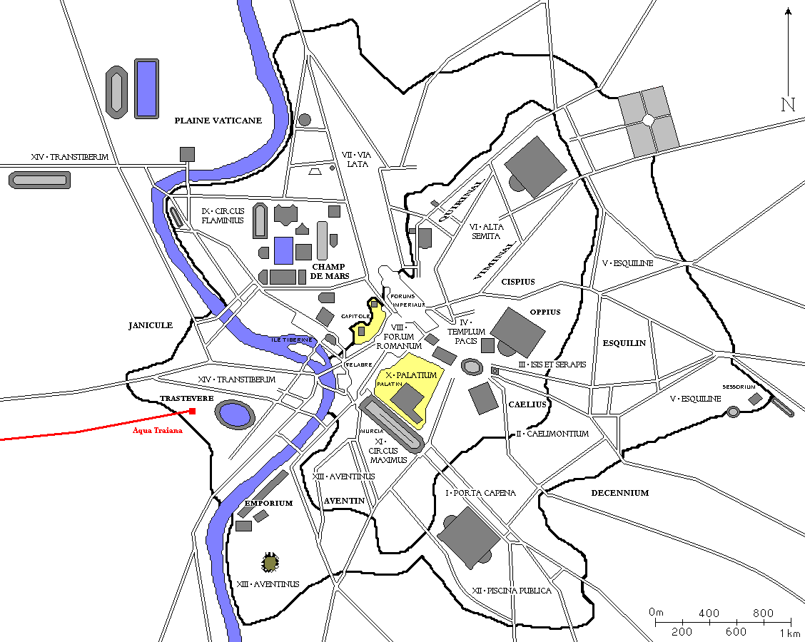 Plan de Rome avec l'aqua Traiana en rouge